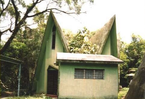 中文（香港）: 皇后山軍營印度廟 Hindu Temple, Burma Lines, Fanling, N.T.